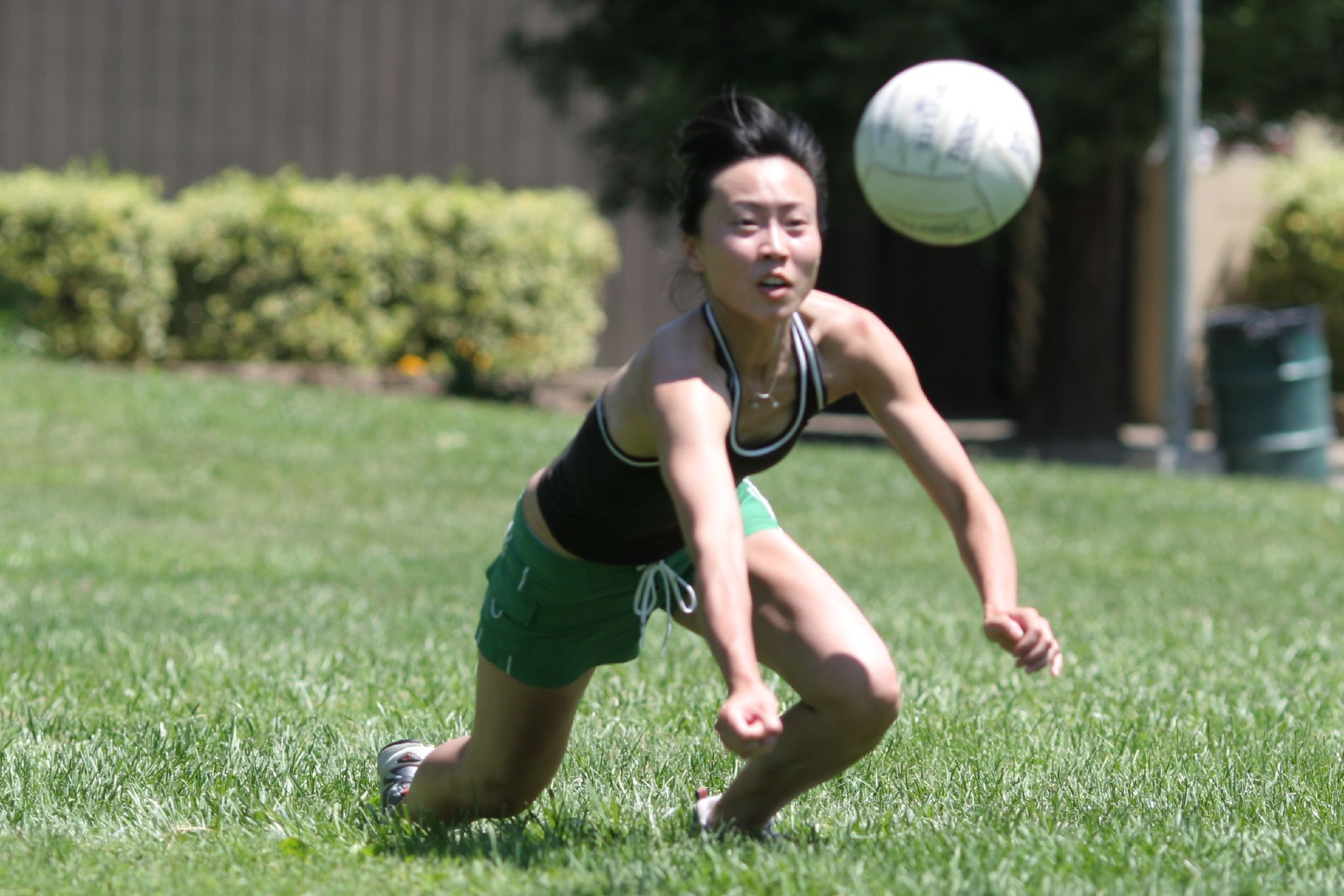 Volleyball defense